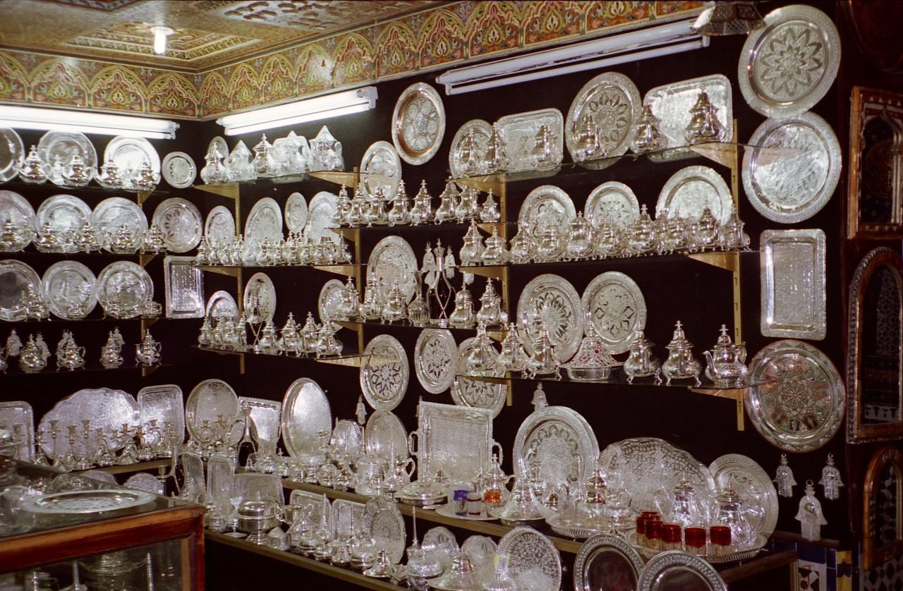 Morocco-132